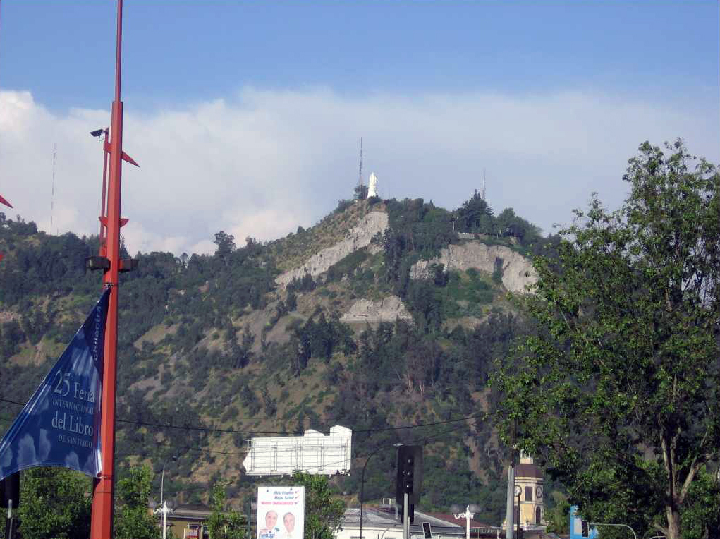 Cerro San Cristóbal visto desde la Estación Mapocho en Santiago, ChileSan Cristóbal